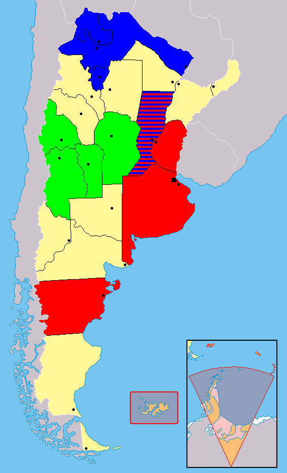 Distribución de los equipos del Torneo Argentino A Temporada 2006/07 por provincias y zonas, basado en Argentina - Político.png. Rojo para la Zona A, verde para la Zona B y azul para la Zona C.